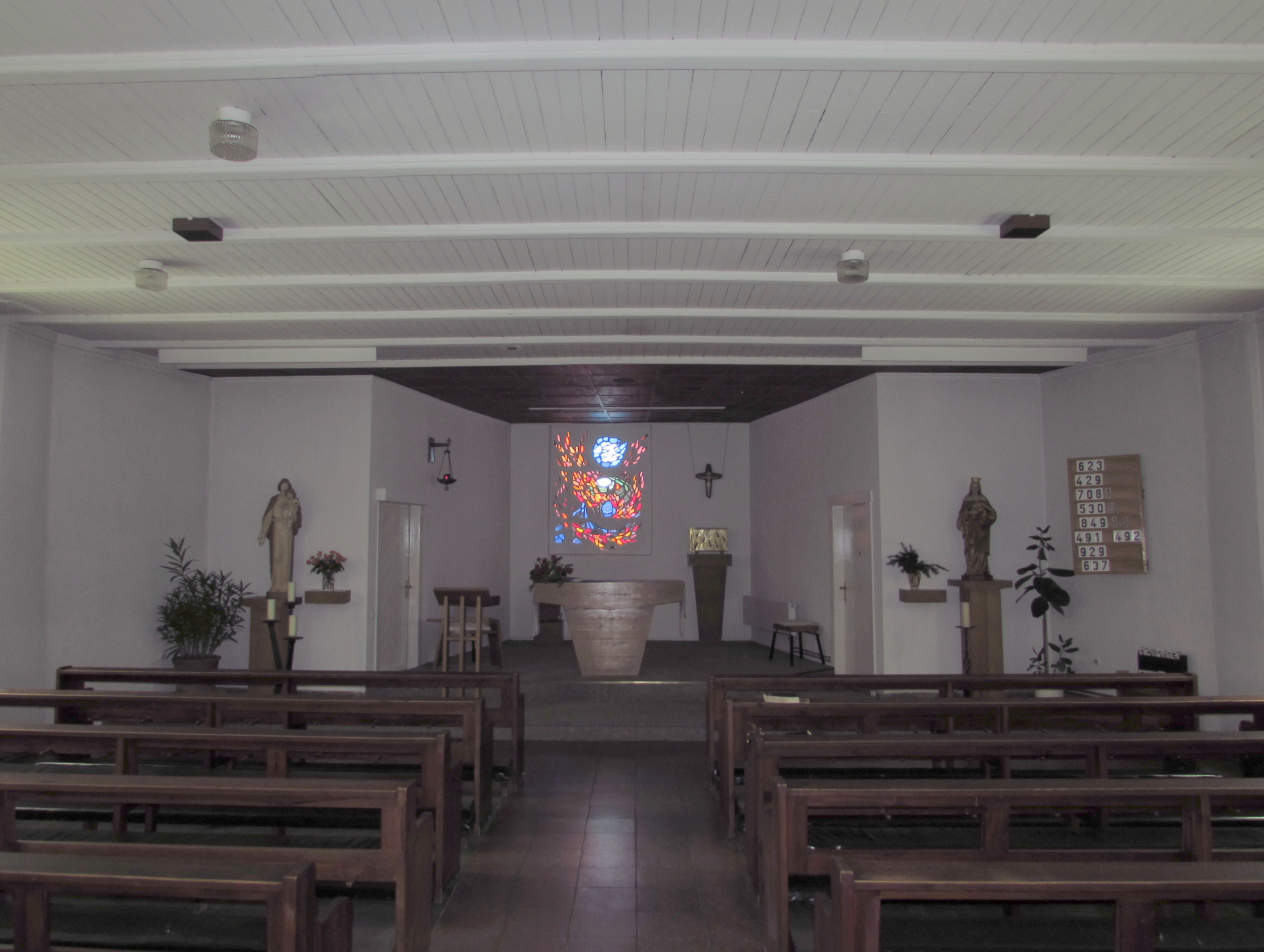 christuskirche brandenburg innenansicht